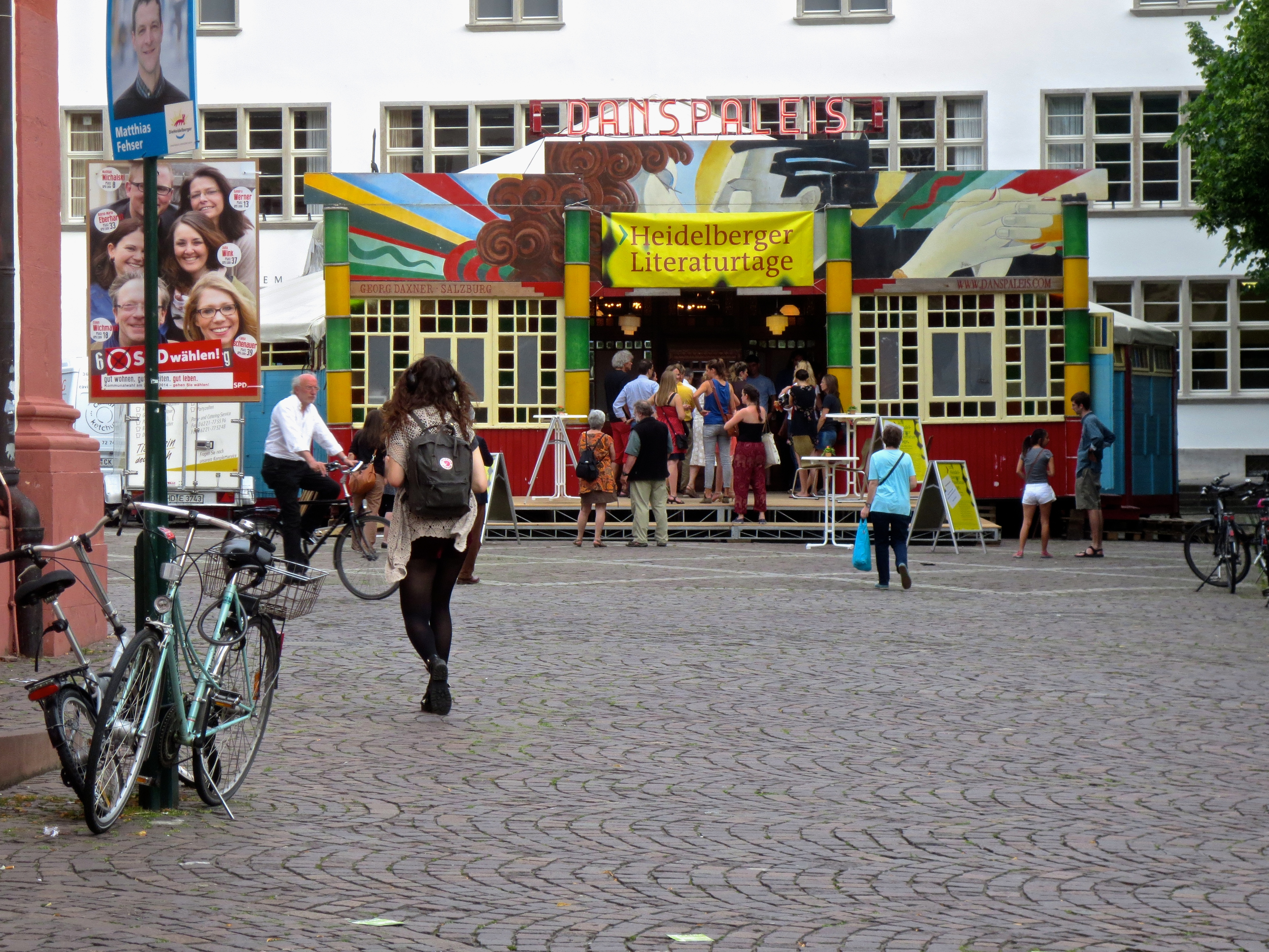 II. Campus Altstadt, Universitätsplatz (Heidelberg), Heidelberger Literaturtage 2014